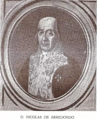 Nicolás Antonio Arredondo Pelegrín. General y político español. Asumió como virrey del Virreinato del Rio de la Plata desde 1789 hasta 1795. Esta imagen es una reproducción fotográfica de un retrato pictórico.